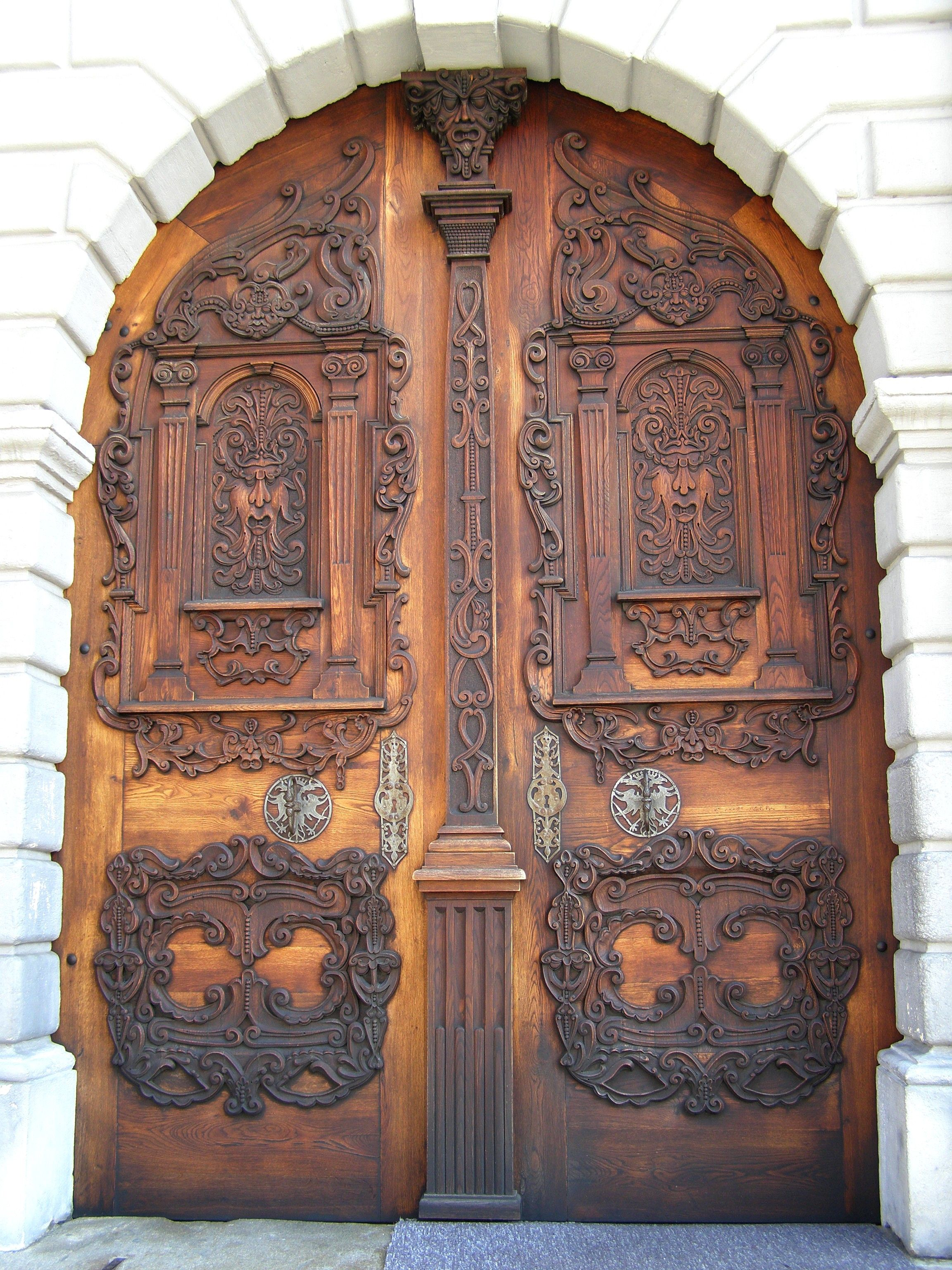 Dvere hlavného portálu kostola